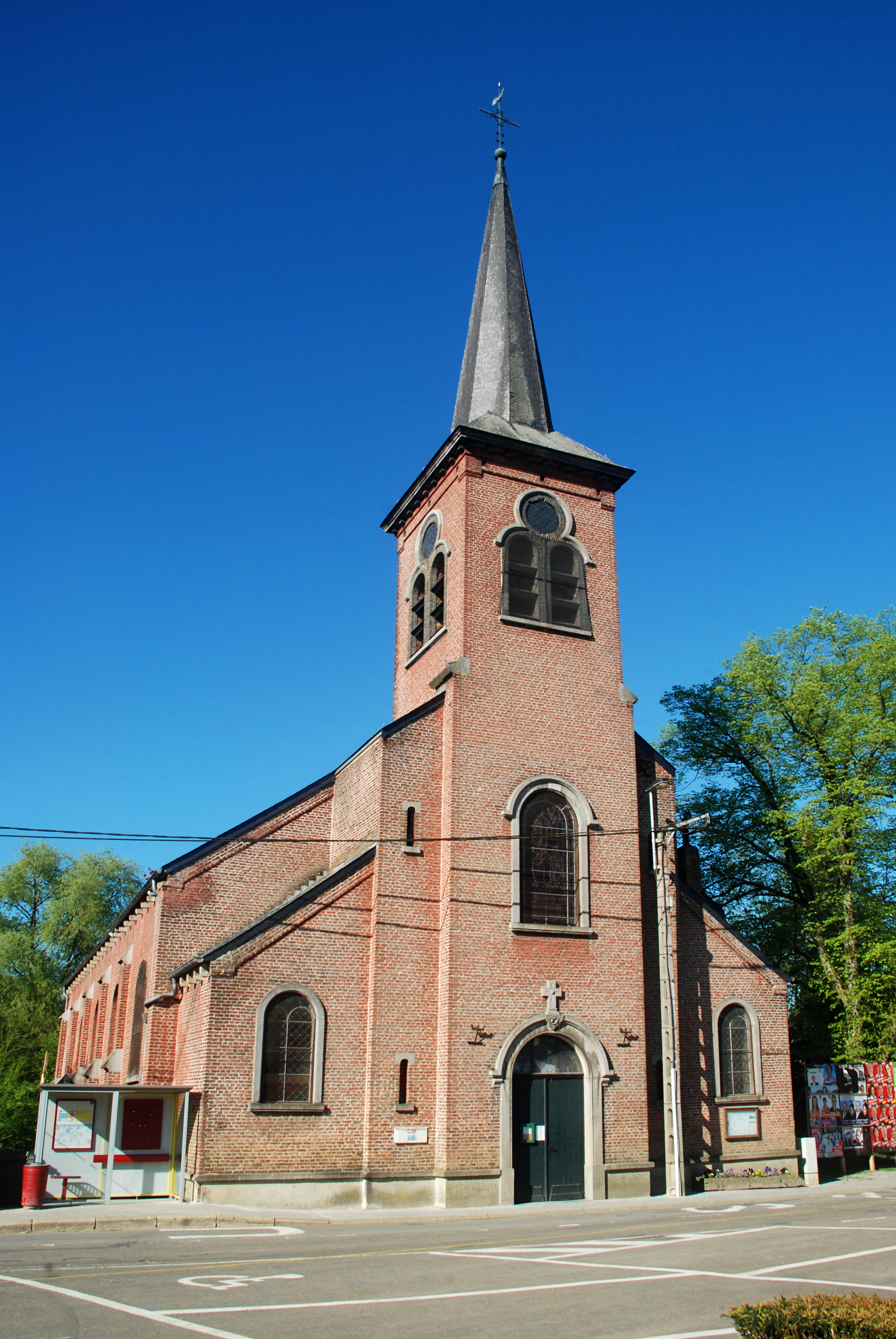 Belgique - Brabant wallon - Court-Saint-Étienne - Église Notre-Dame de Tangissart (architecte Émile Coulon)